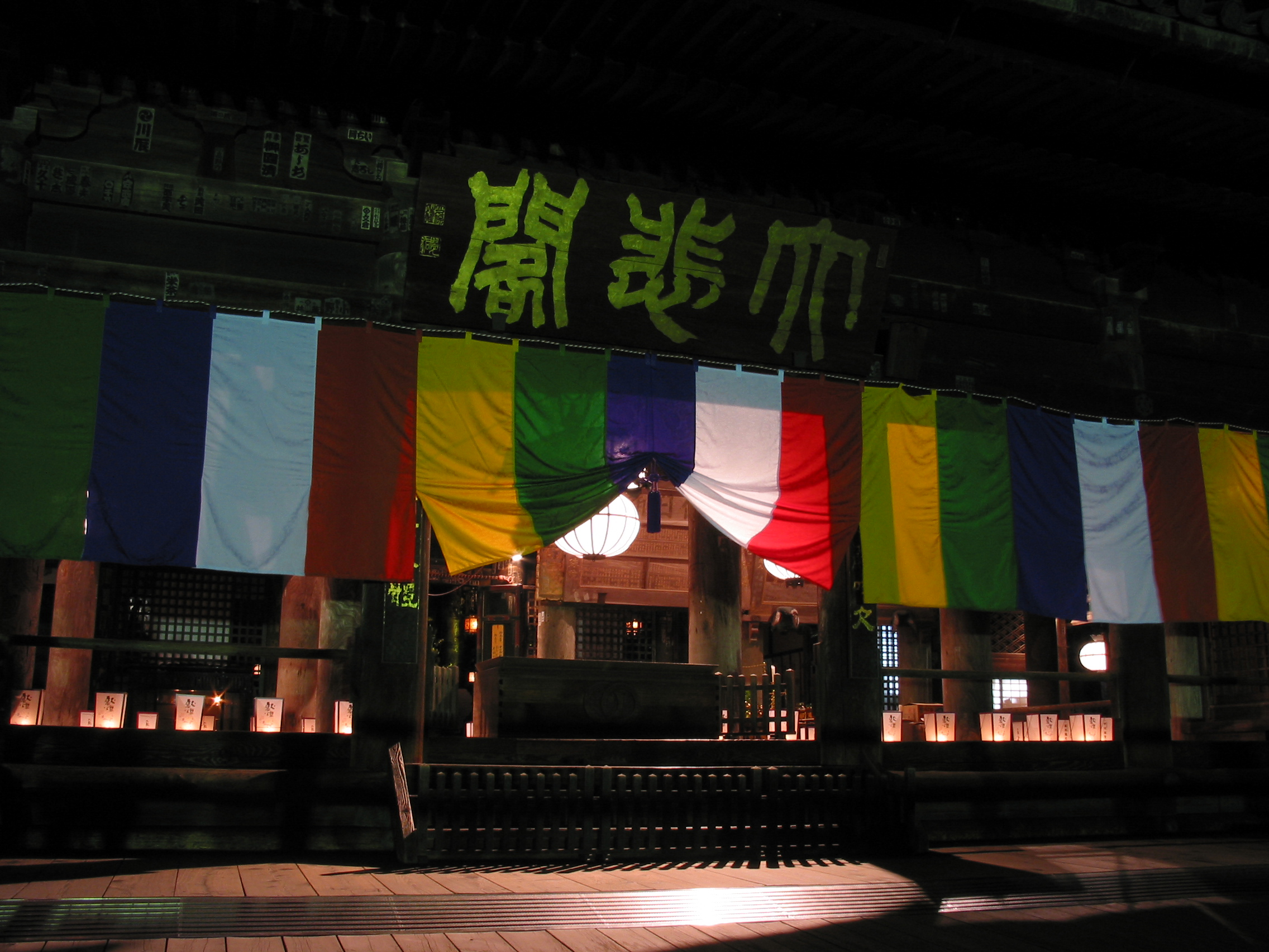 Kannon-Mantōe of Hasedera at Hase Sakurai, Nara Pref., Japan. 真言宗豊山派総本山長谷寺の観音万燈会奈良県桜井市初瀬で撮影